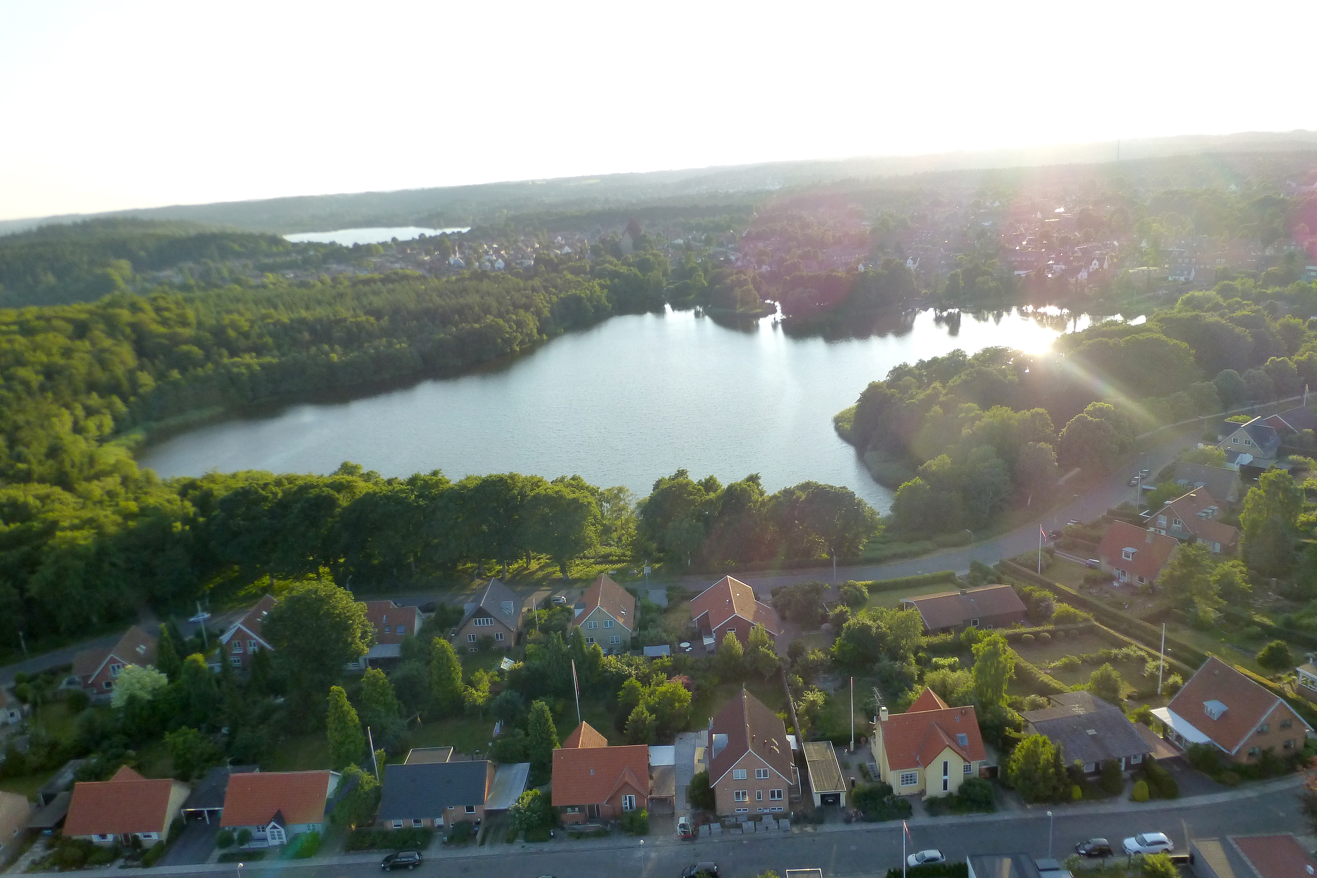 Lyngsø ved Silkeborg set fra øst